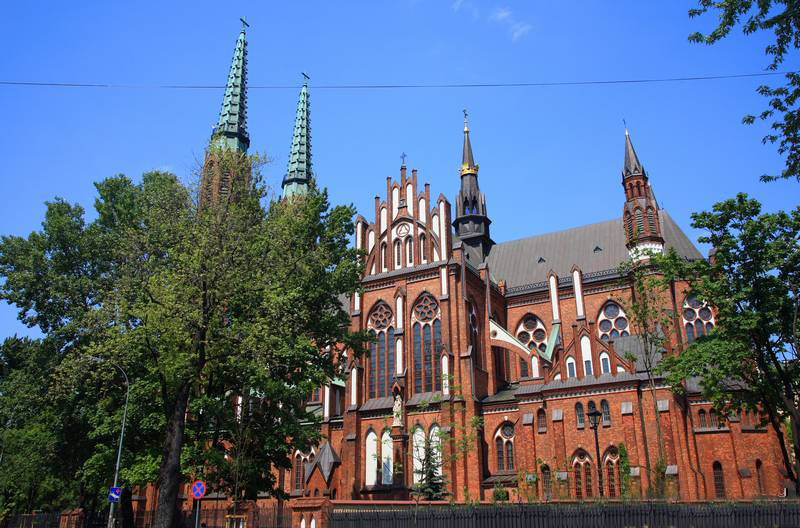 Warszawa (Polska)